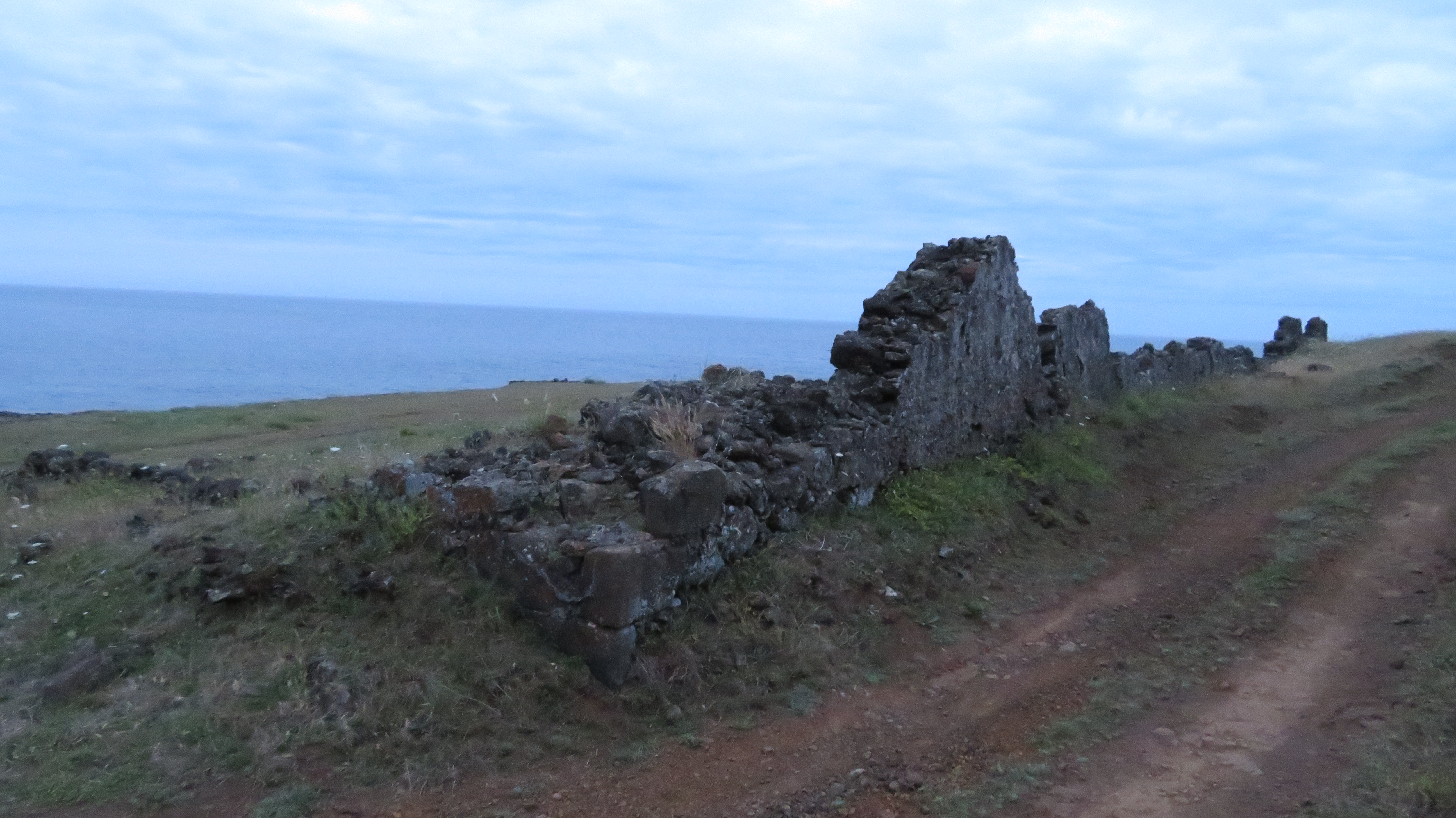 Ruínas do Forte de Santa Catarina, Ilha Graciosa, Portugal